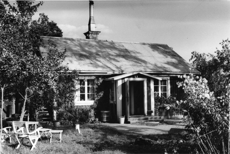 Torpet Råsten, Viksjö, Järfälla. Torpet låg under Viksjö gård och var beläget cirka 1,5 km väster om Viksjö gård, ungefär 1 km nordöst om skäftingebroarna, precis vid gränsen (rågången) mot Görväln. Det byggdes på 1820-talet och revs år 1970.